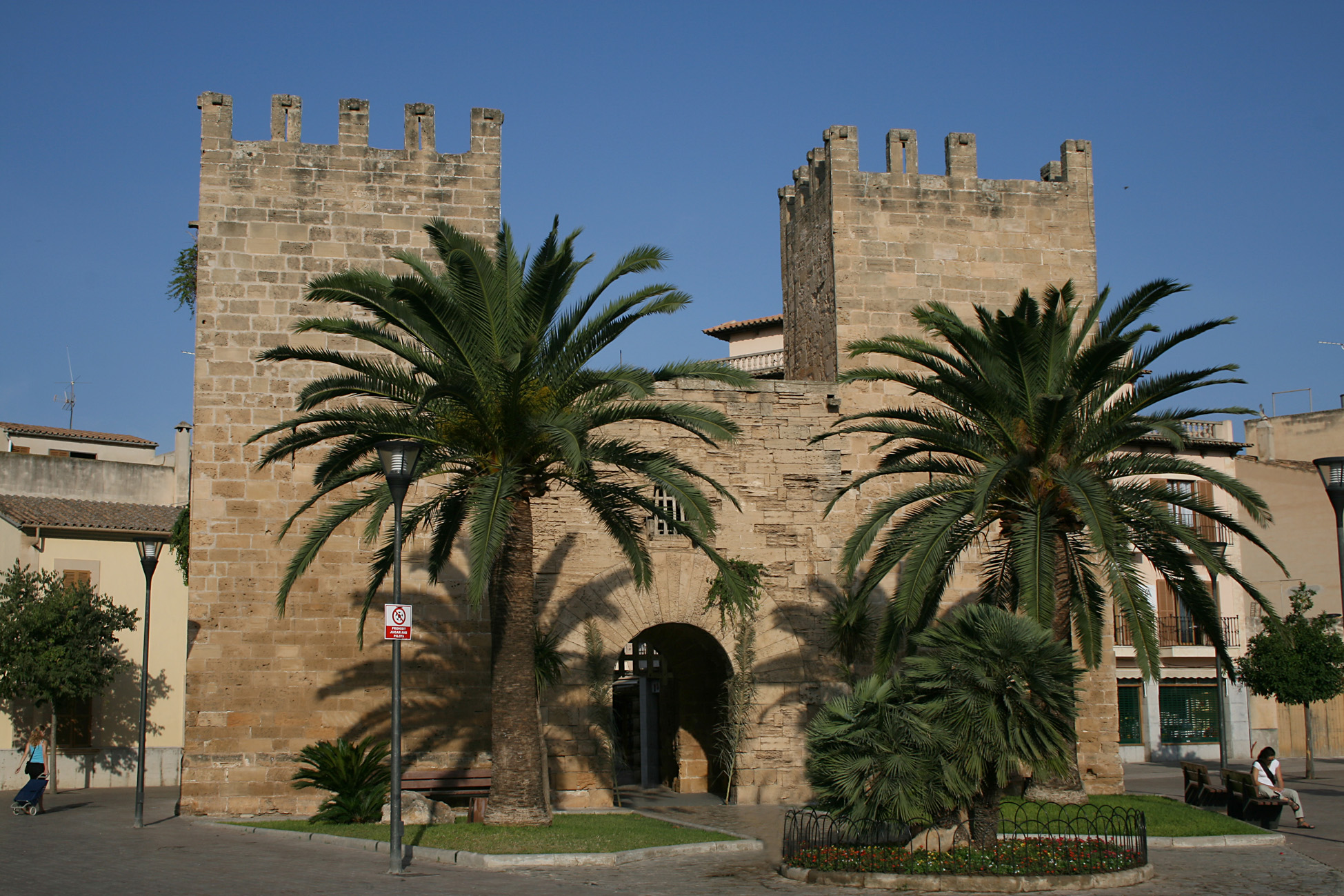 Alcúdia, Mallorca, Spain